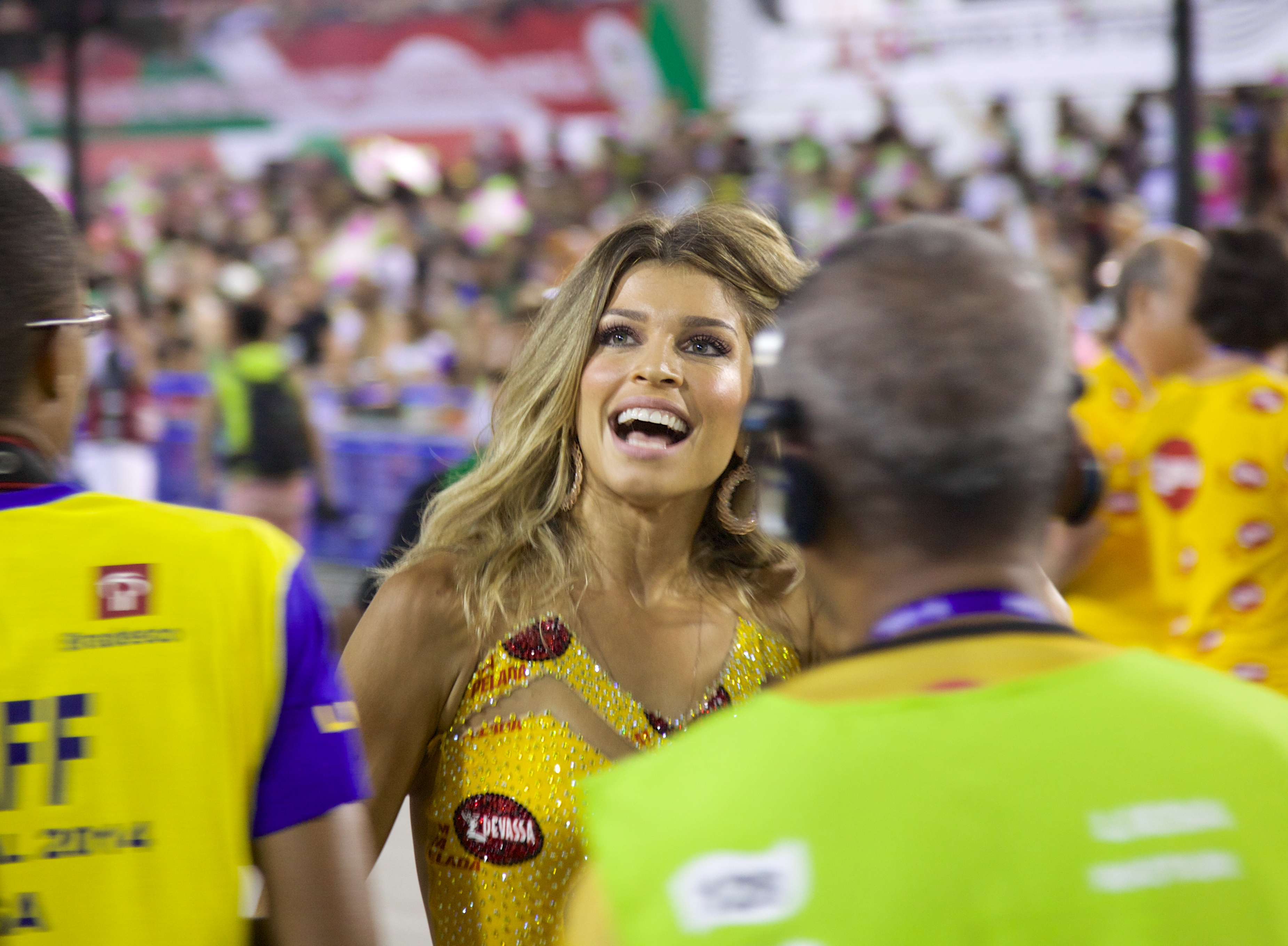 Grazi Massafera no Carnaval 2014 no Sambadrome Marquês de Sapucaí no Rio de Janeiro, Brasil.